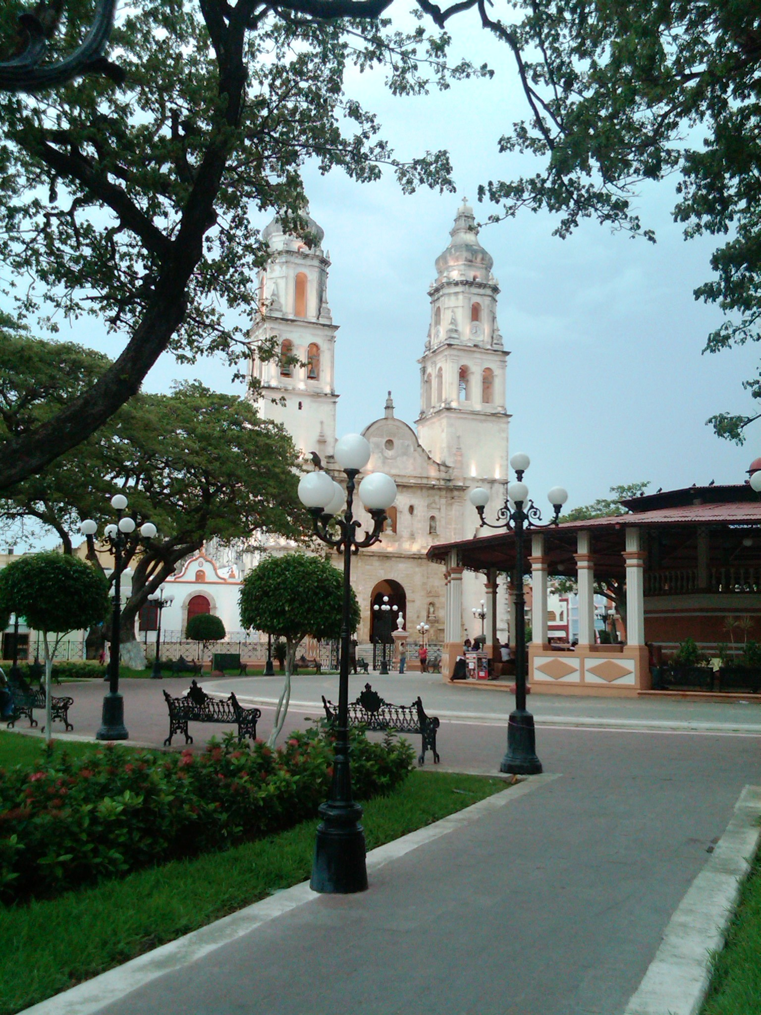 Actual Zocalo de la Capital Campechana